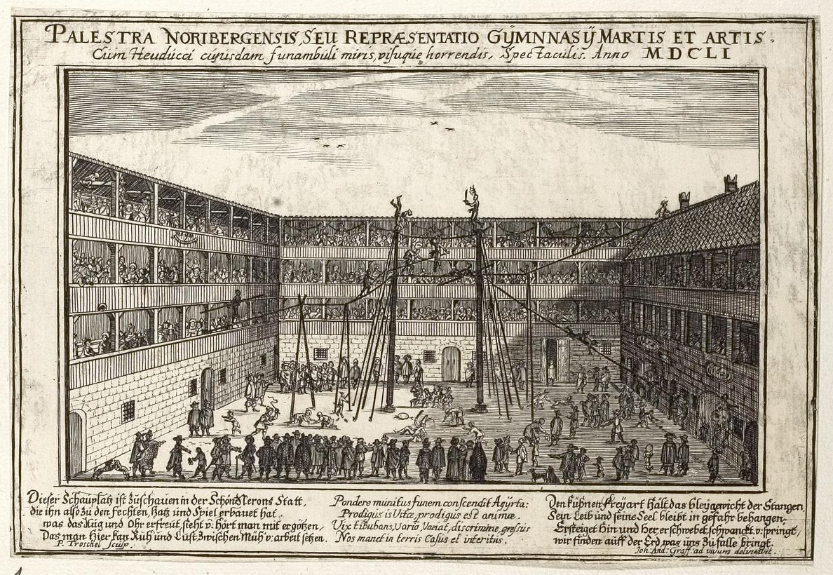 Grafik aus dem Klebeband Nr. 3 der Fürstlich Waldeckschen Hofbibliothek Arolsen Motiv: "Palestra Noribergensis, seu Repraesentatio Gymnasy Martis et Artis. Cum Heuducci cupisdam funambuli miris, visusque horrendis, Spectacilies. Anno MDCLI"